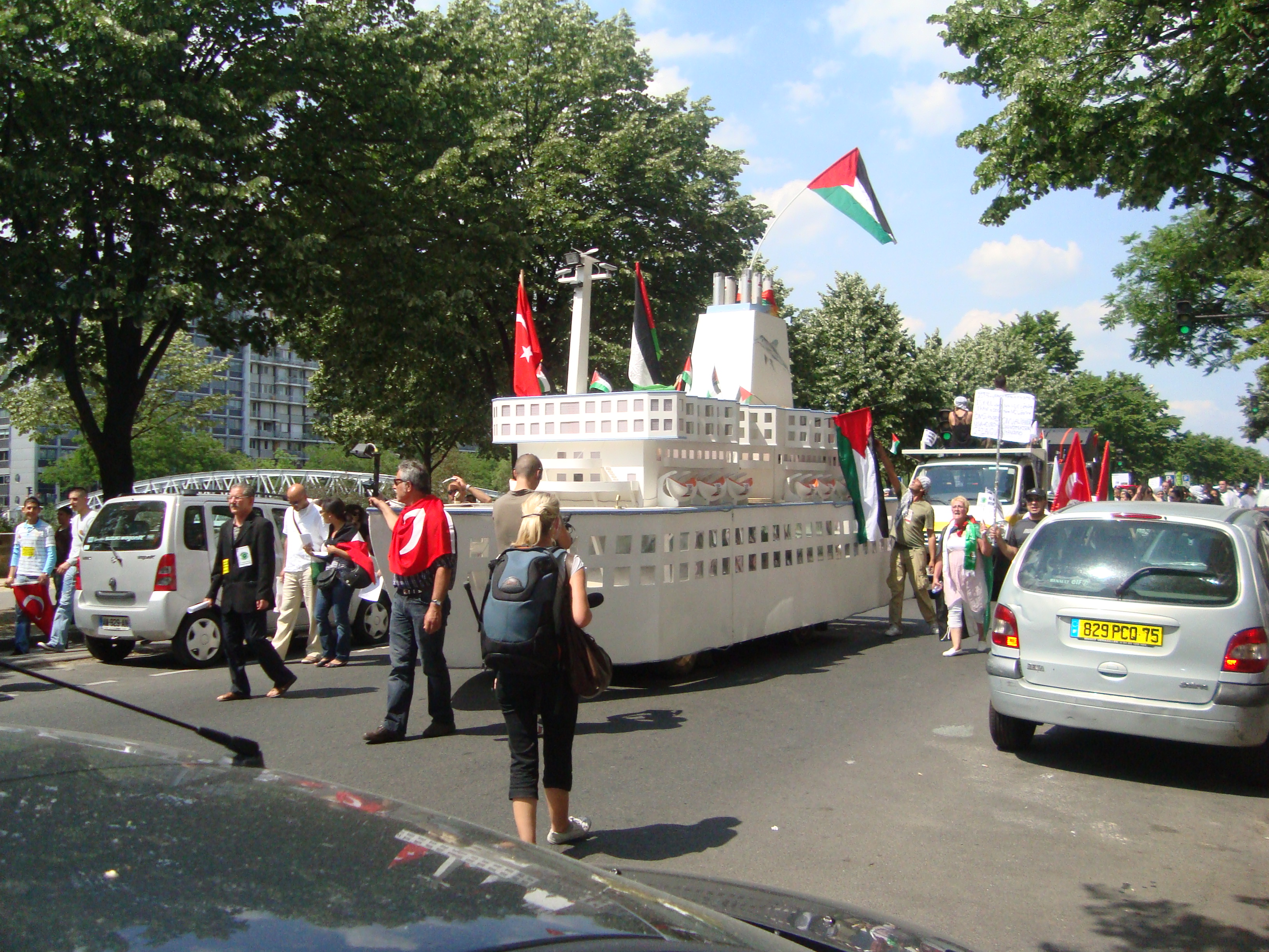 Manifestants contre la politique israélienne suite à l'abordage de la flotille pour Gaza